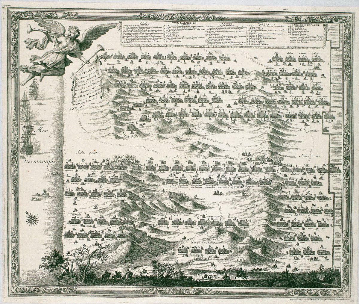 Bataille Des Dunes prez Dunquerque, gagnée par l'Armée du Roy, commandée par le Vicomte de Turenne sur l'Armée d'Espagne, commandée par Don Juan d'Austriche, le 14 juin 1658